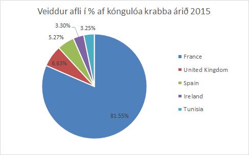 Veiddur afli í % af kóngulóa Krabba árið 2015